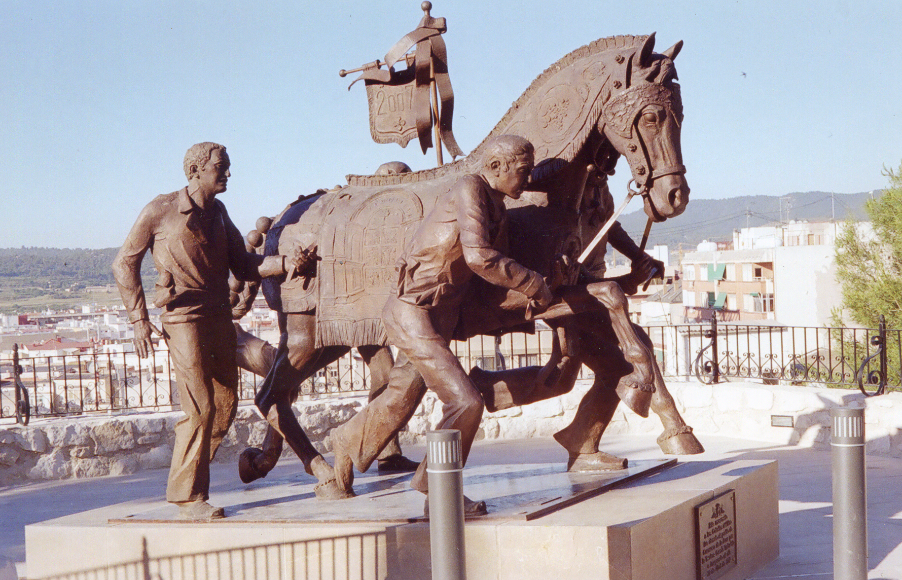 "A los caballos del vino". Autor: Rafael Pi Belda. Año: 2007. Tamaño: 3,60 x 2,00 x 3,50m. Material: bronce. Caravaca de la Cruz (Murcia).